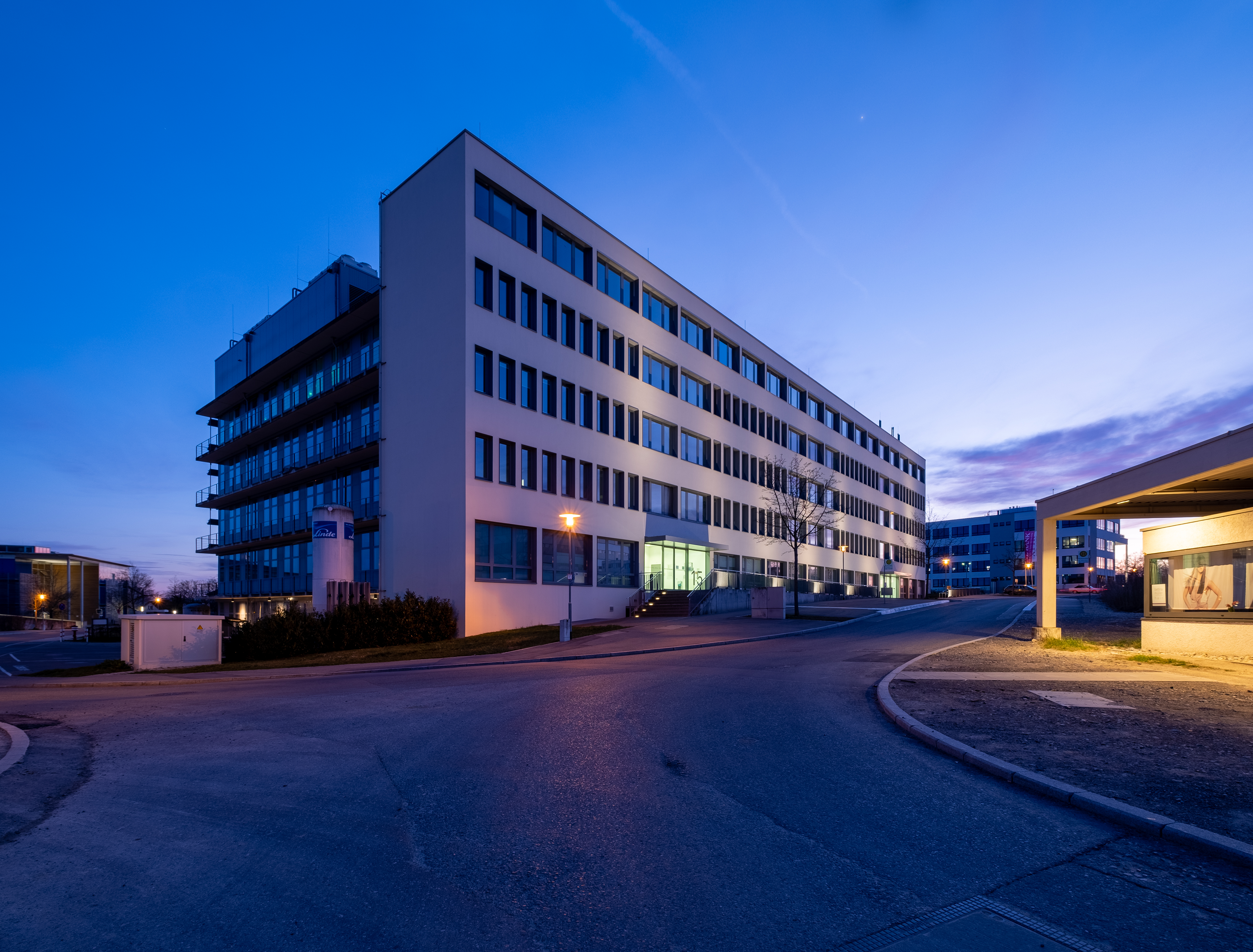 Curevac in Tübingen